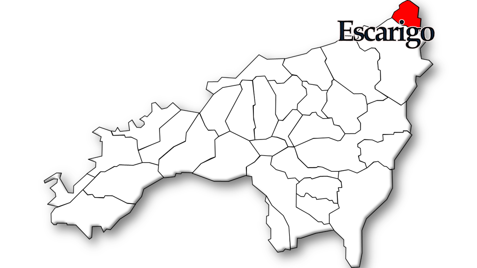 População